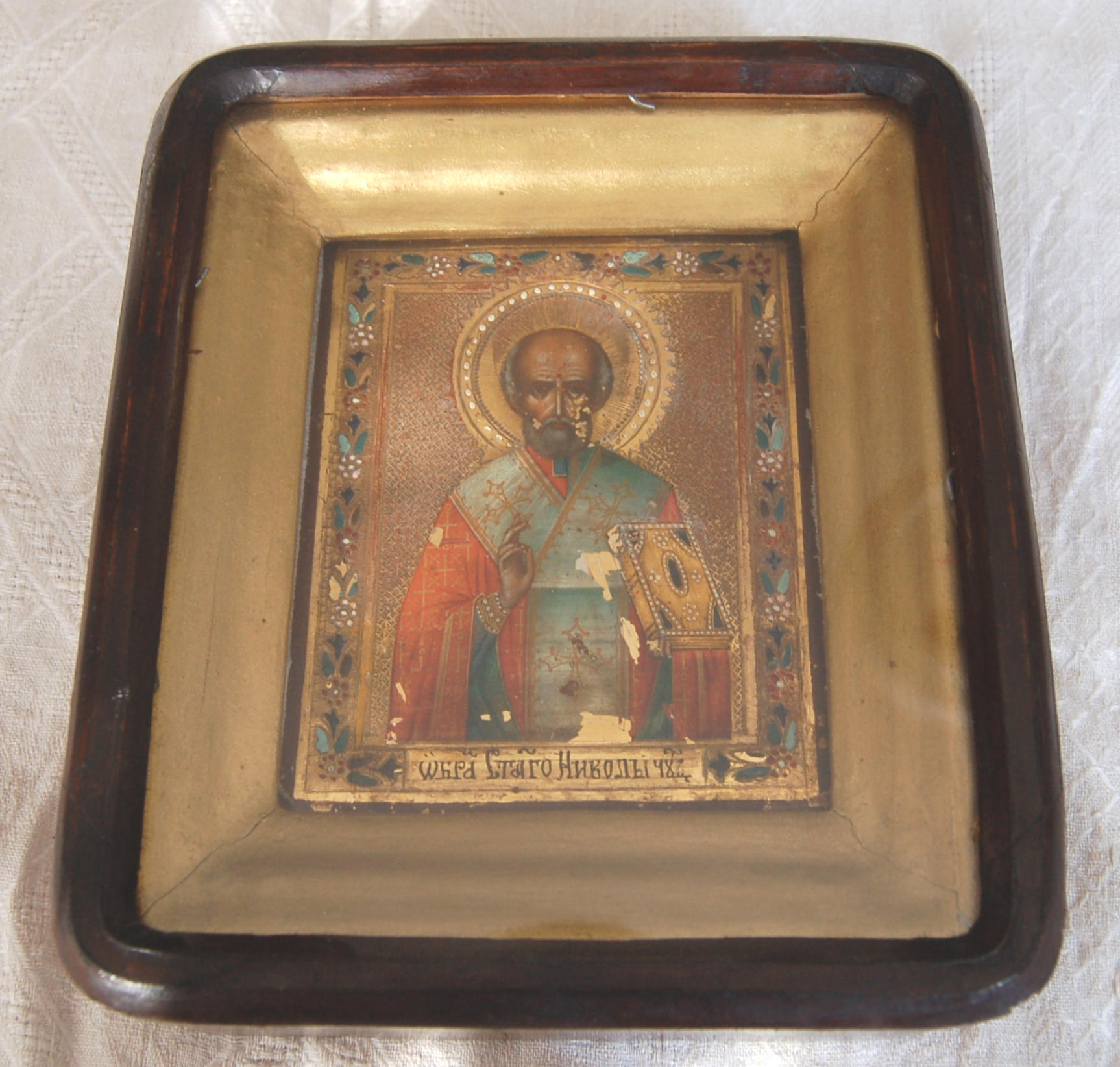 "Образ Святаго Николы Чудотворца" (надписание) в киоте, деревня Дидяково, Чеховский район, Московская область, конец XIX — начало XX века; отреставрирован в 1990-е годы.